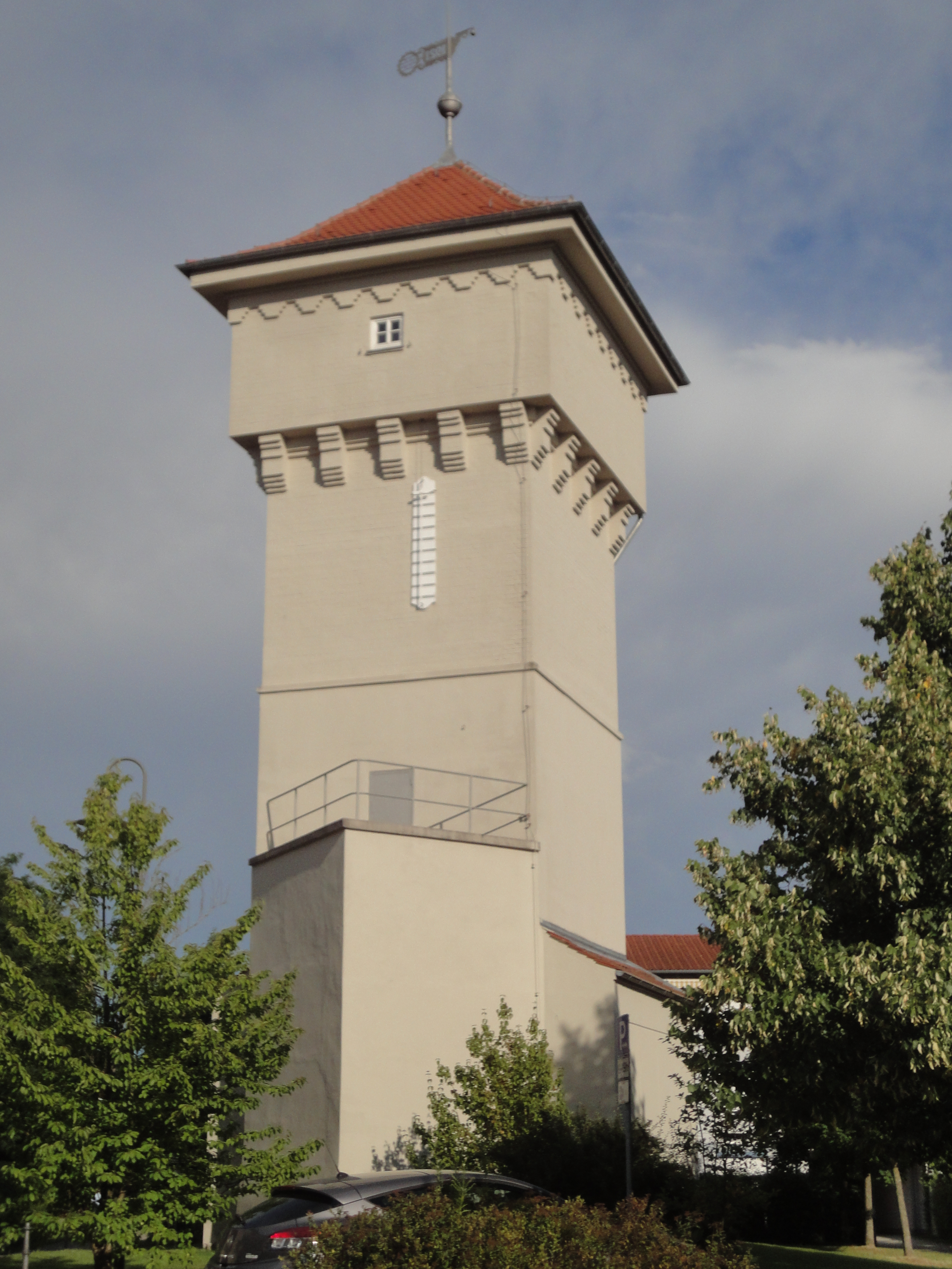 Wasserturm, Zeltdachbau über quadratischem Grundriss, auf der Windfahne bez. 1921; auf dem ehem. Fabrikgelände der Keim-Farben-GmbH. Baudenkmal Bayern D-7-72-184-26